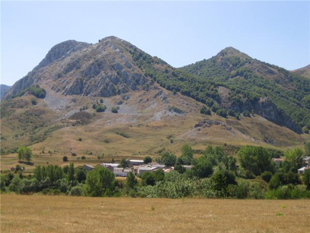 Liegos desde las cruces